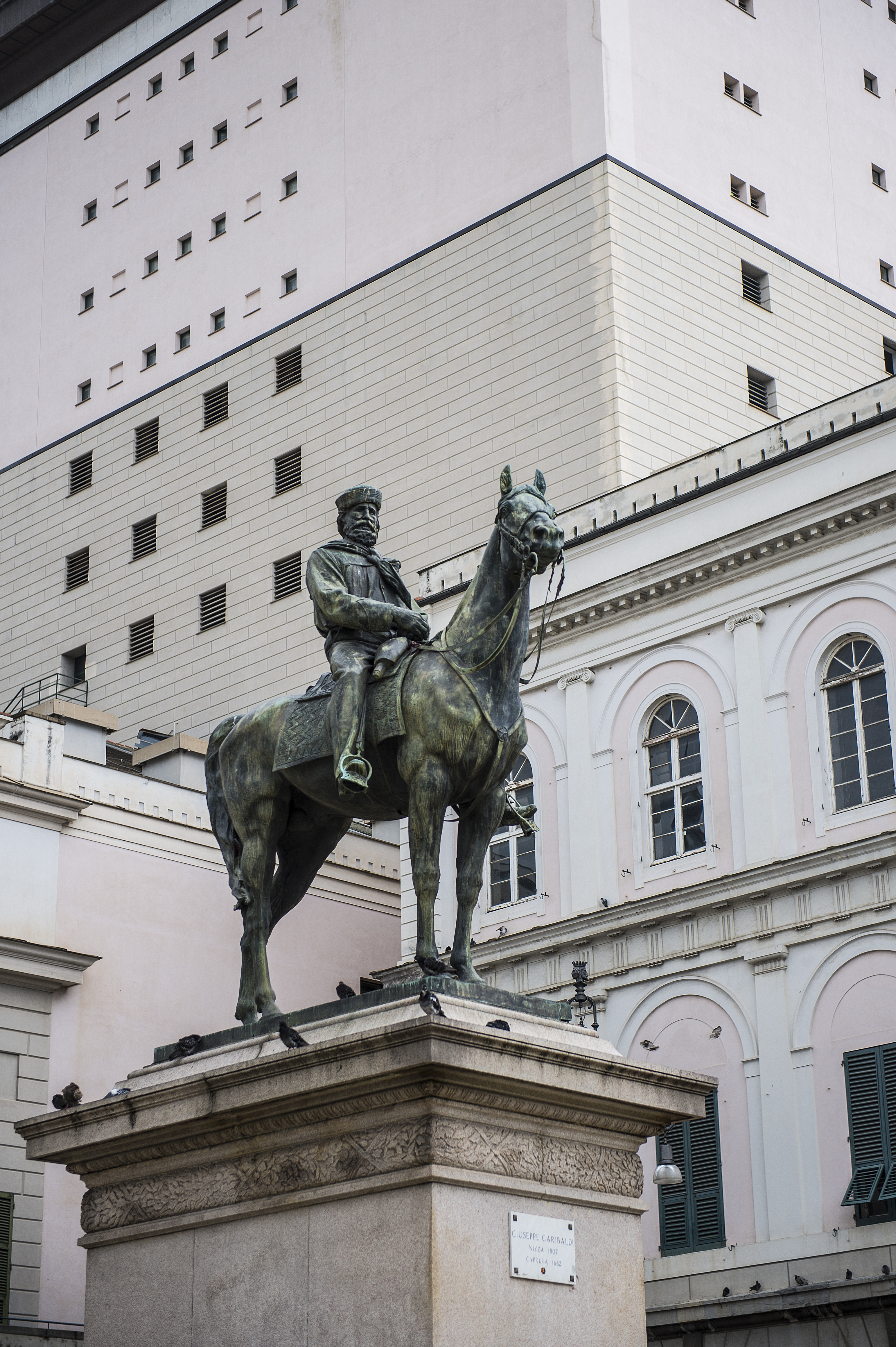 Statua equestre di Garibaldi a Genova This is a photo of a monument which is part of cultural heritage of Italy.